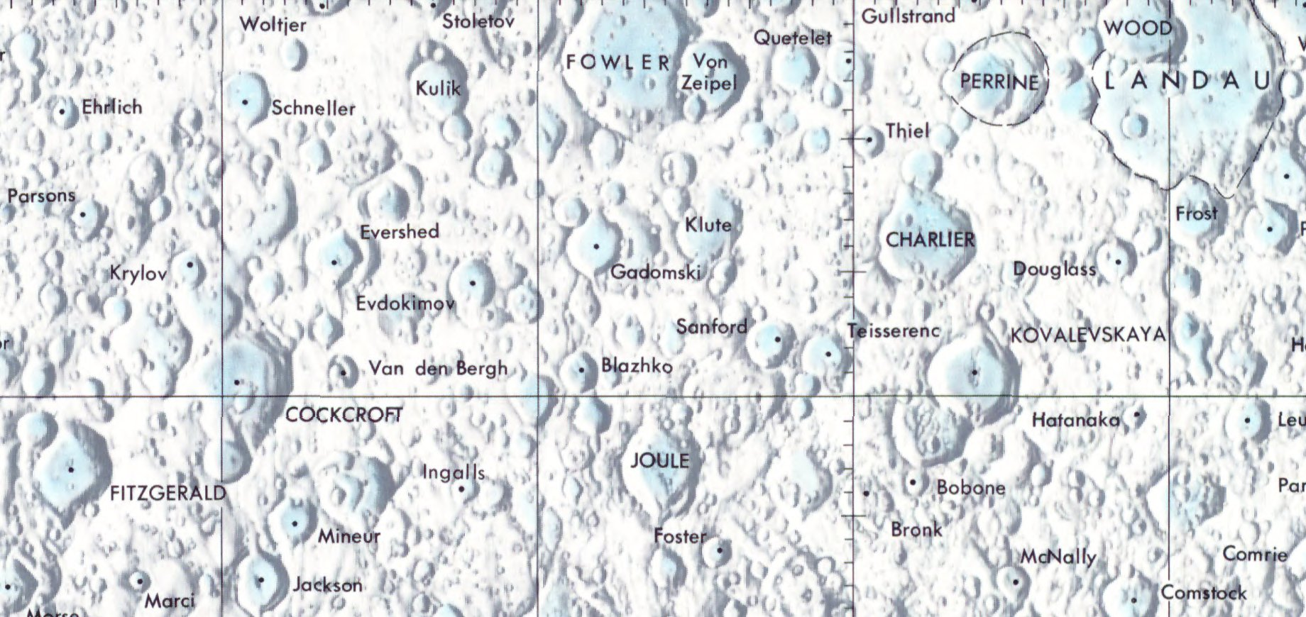 Cráter lunar Schneller. Localización. (Lunar Chart LPC1. Second Edition)